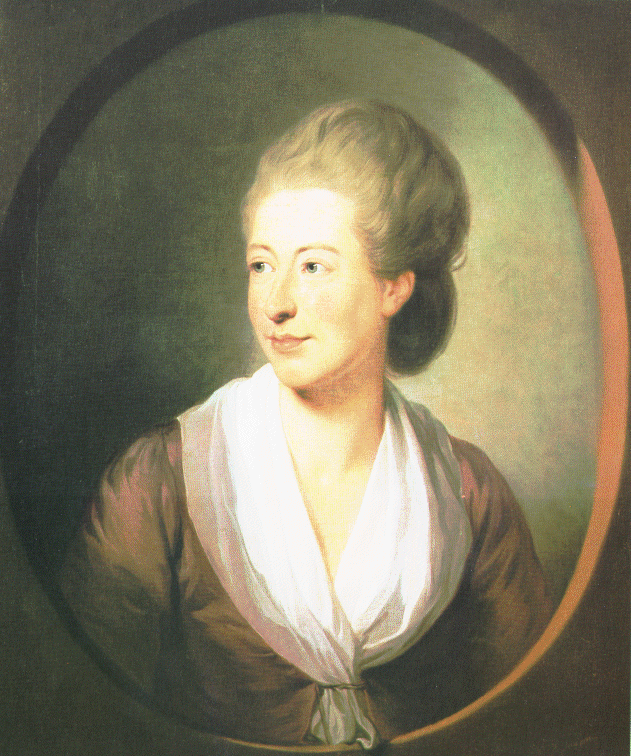 Isabelle de Charrière, née Isabelle Agneta Elisabeth van Tuyll van Serooskerken, dite Belle de Zuylen (1740-1805)